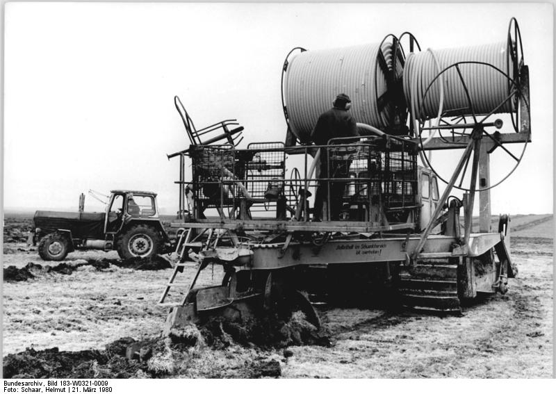 Römhild, Meliorationsmaschine, Drainage ADN-ZB Schaar 21.3.80 Bez. Suhl: Bedeutende Ertragssteigerungen noch in diesem Jahr sind mit der Fertigstellung des Meliorationsobjektes in der LPG (P) Römhild zu erwarten. Auf einer Fläche von rund 160 ha, die zum Teil wegen stauender Nässe nicht intensiv genutzt werden konnte, bringen Mitarbeiter des VEB Meliorationsbau Suhl mit dem Meliomat-Universal täglich bis zu 3 km PVC-Drainrohre in den Boden. Ende des Monats sollen die Arbeiten abgeschlossen sein. - siehe auch W0321-10N